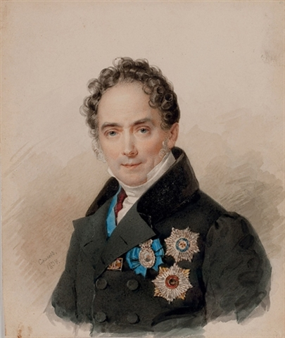 Viktor Pavlovich Kochubey (11.11.1768-3.6.1834) - the statesman, count (Кочубей Віктор Палович)